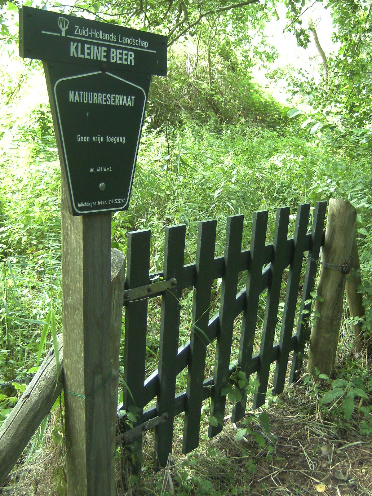 Toegangshek natuurgebied 'Kleine Beer' tussen Rozenburg en Oostvoorne nabij de Rozenburgse keersluis